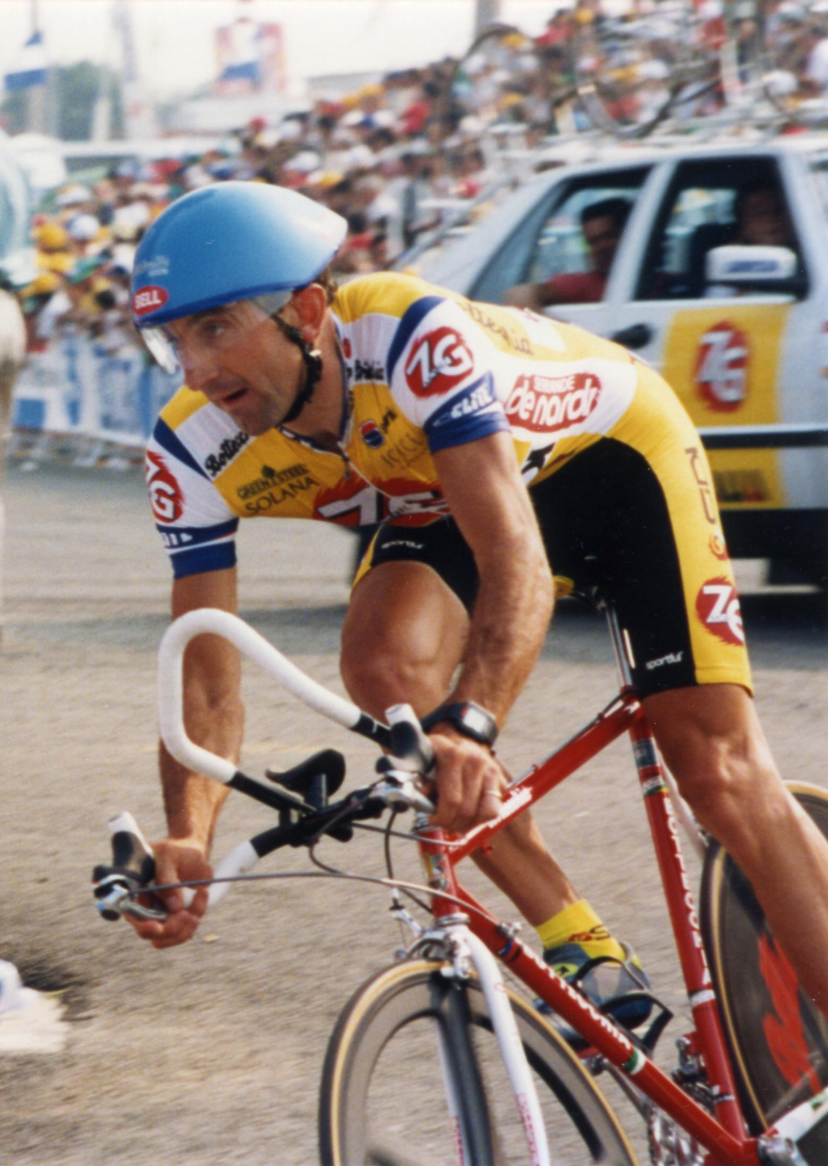 TOUR DE FRANCE 1993